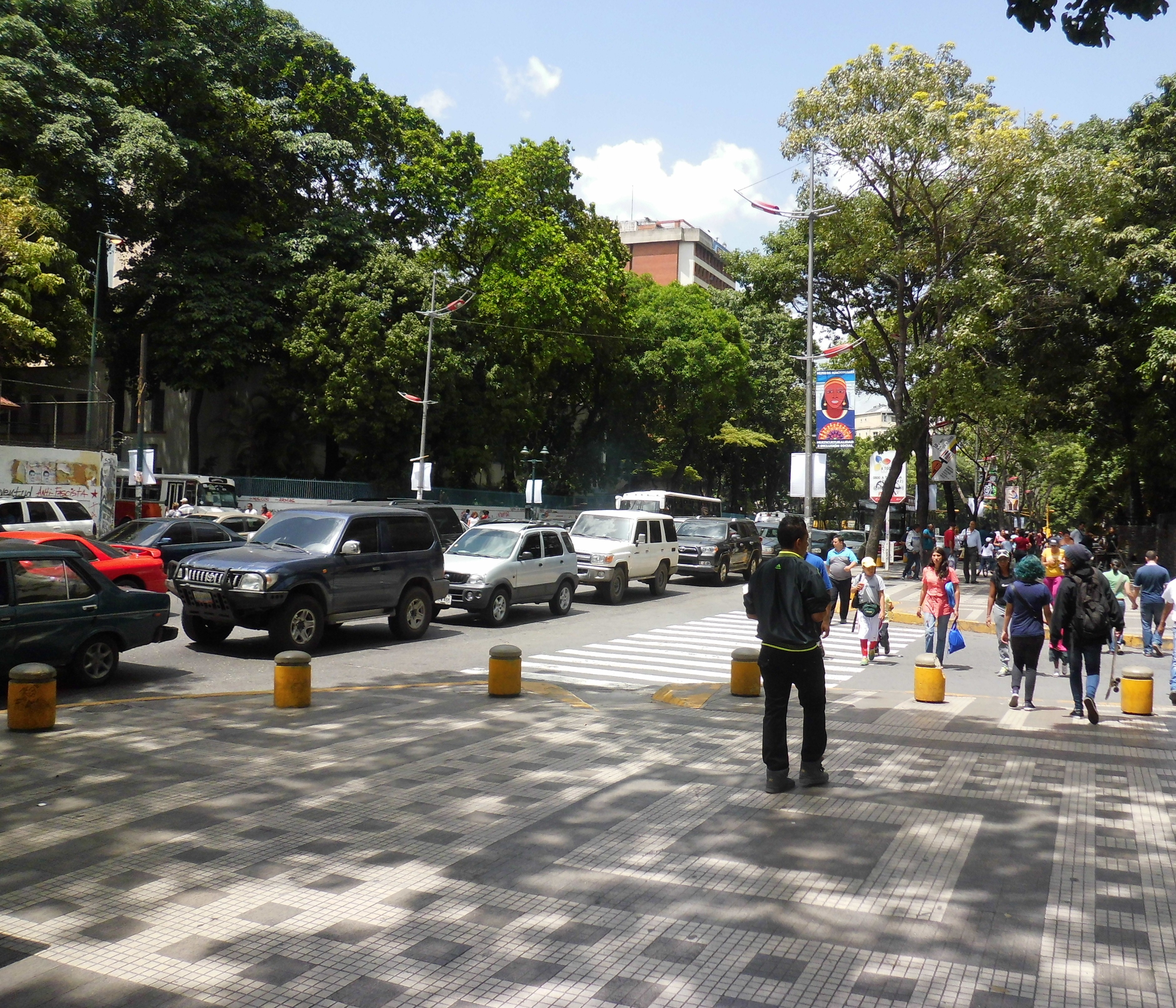 Avenida México, frente al Colegio Experimental Venezuela, Caracas, Distrito Capital - Venezuela